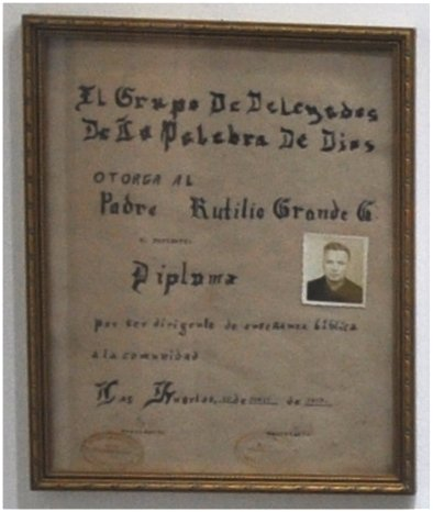 Diploma entregado por el Grupo de Delegados de la Palabra de Dios al Padre Rutilio Grande, Salón de Mártires, UCA, El Salvador.